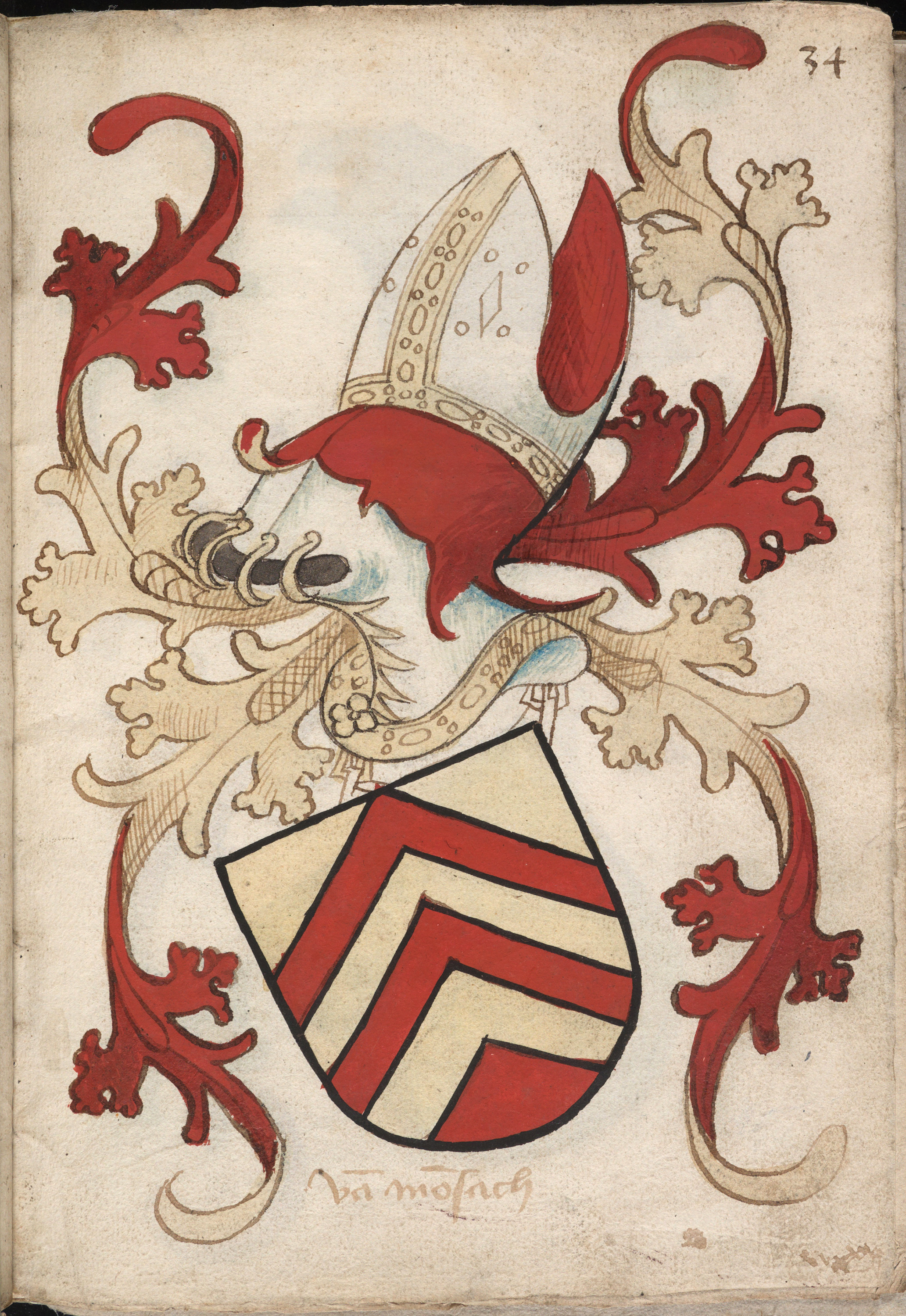 Dit is het wapen van de heren, sinds 1429 graven van Hanau. De moeder van Agnes van Falkenstein (ca. 1337-1380) [zie fol. 33r] was Elisabeth van Hanau-Münzenberg (ca. 1317-1365). Hanau ligt in Duitsland, ten oosten van Frankfurt, Hessen.